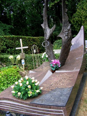 Stanisław Skalski's monument (Powązki Cemetery; Cmentarz Komunalny, d. Wojskowy)